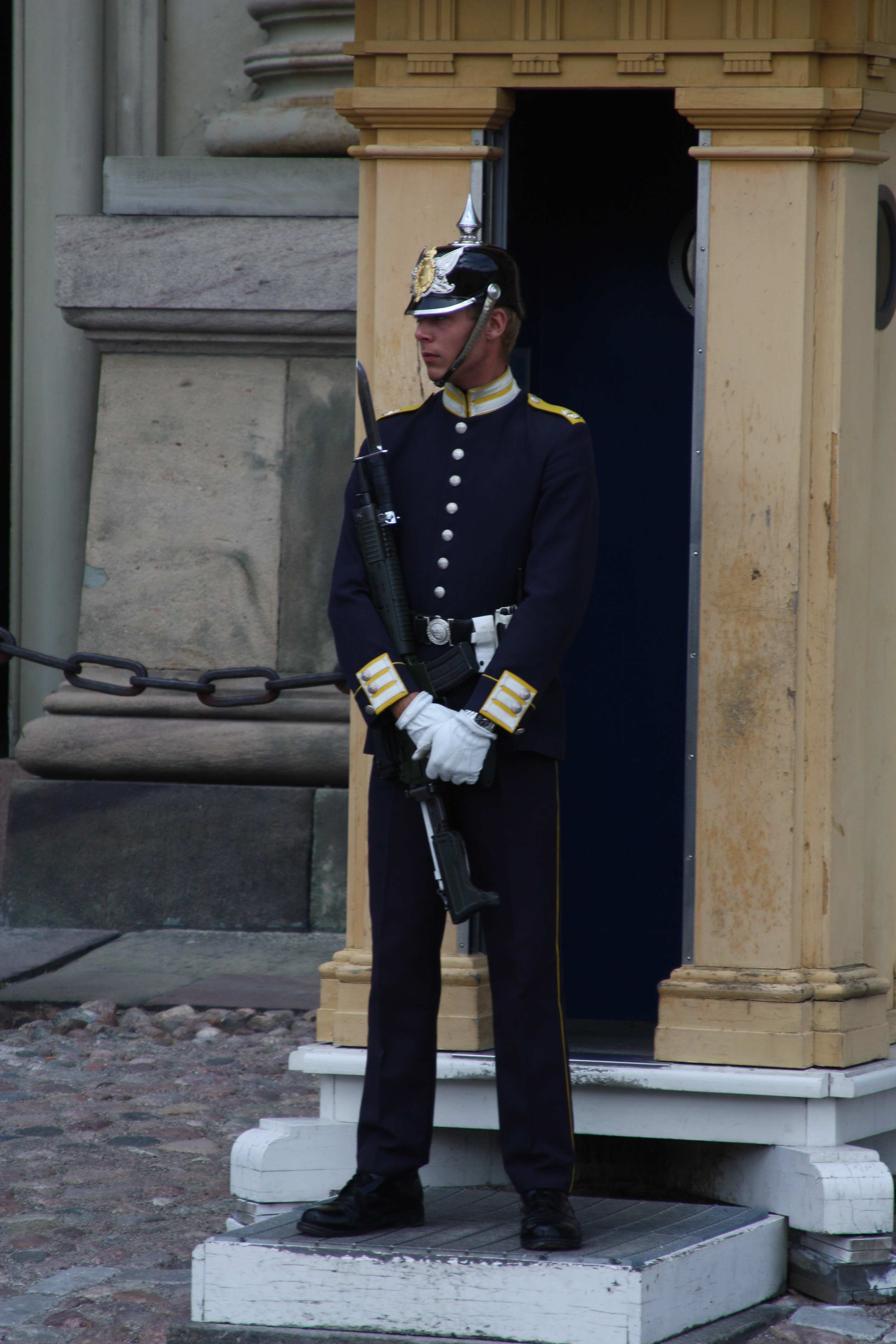 Stockholm